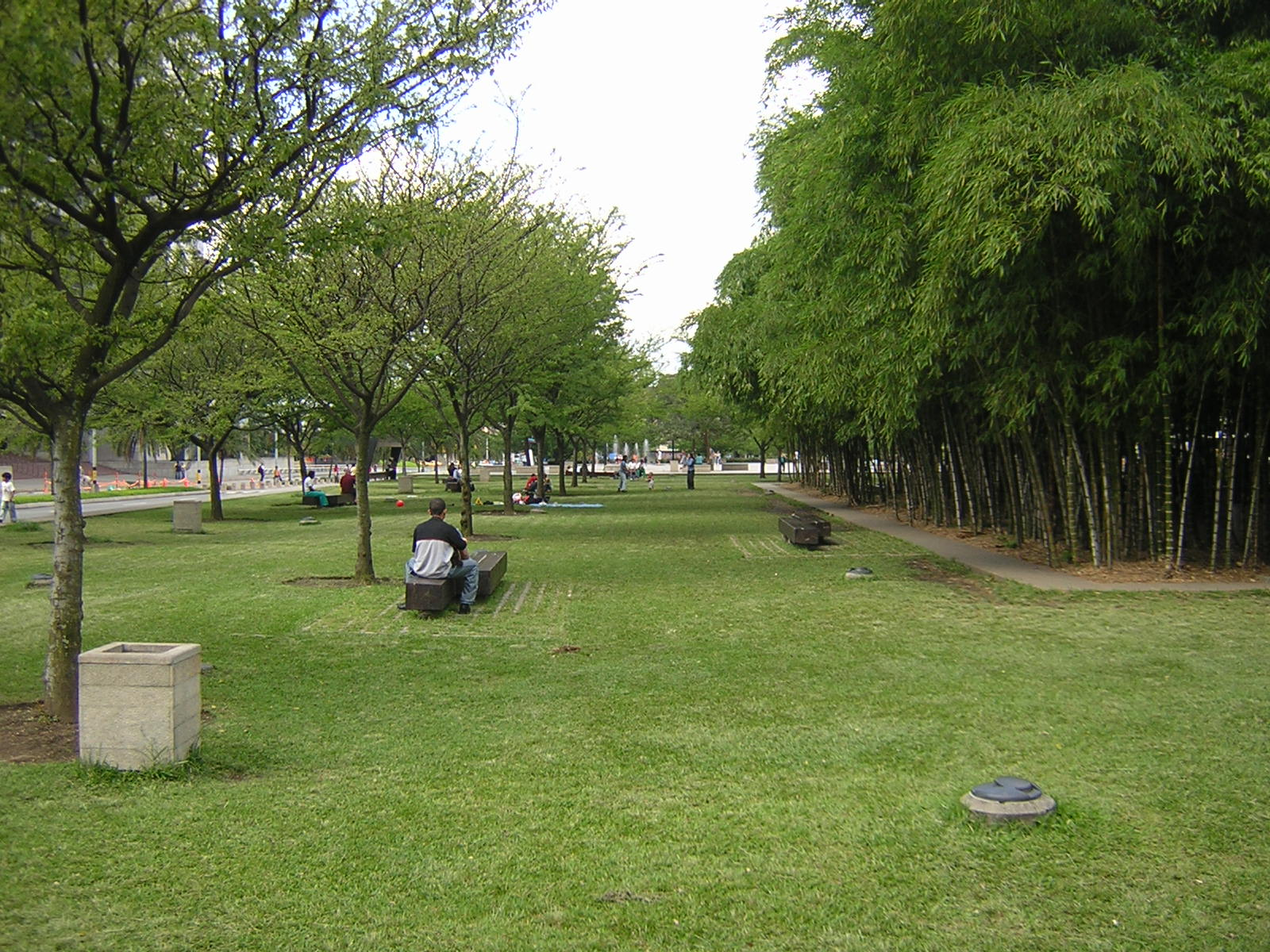 Parque de los Pies Descalzos, Medellín, Colombia